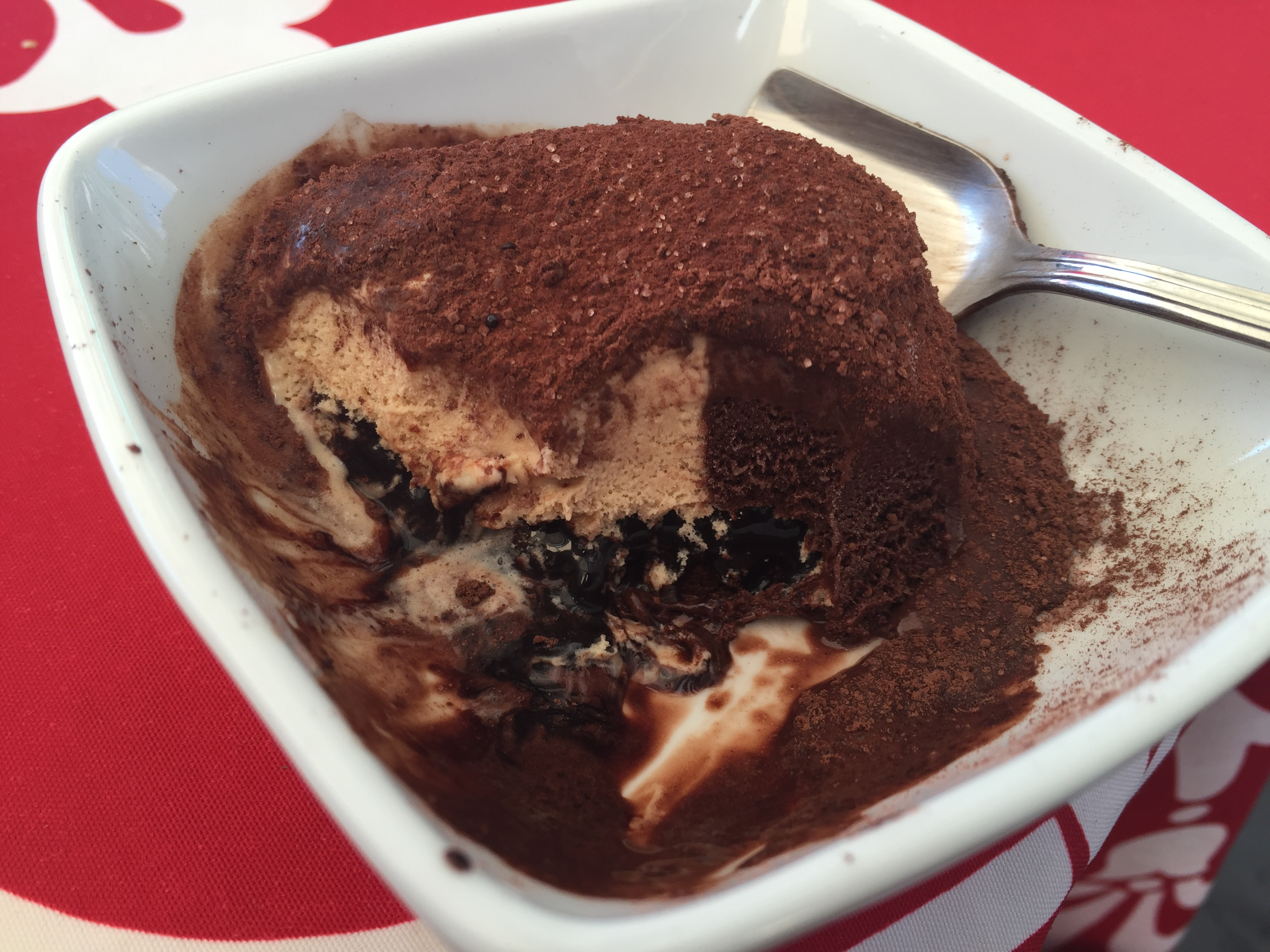 So sieht das Eis von innen aus.